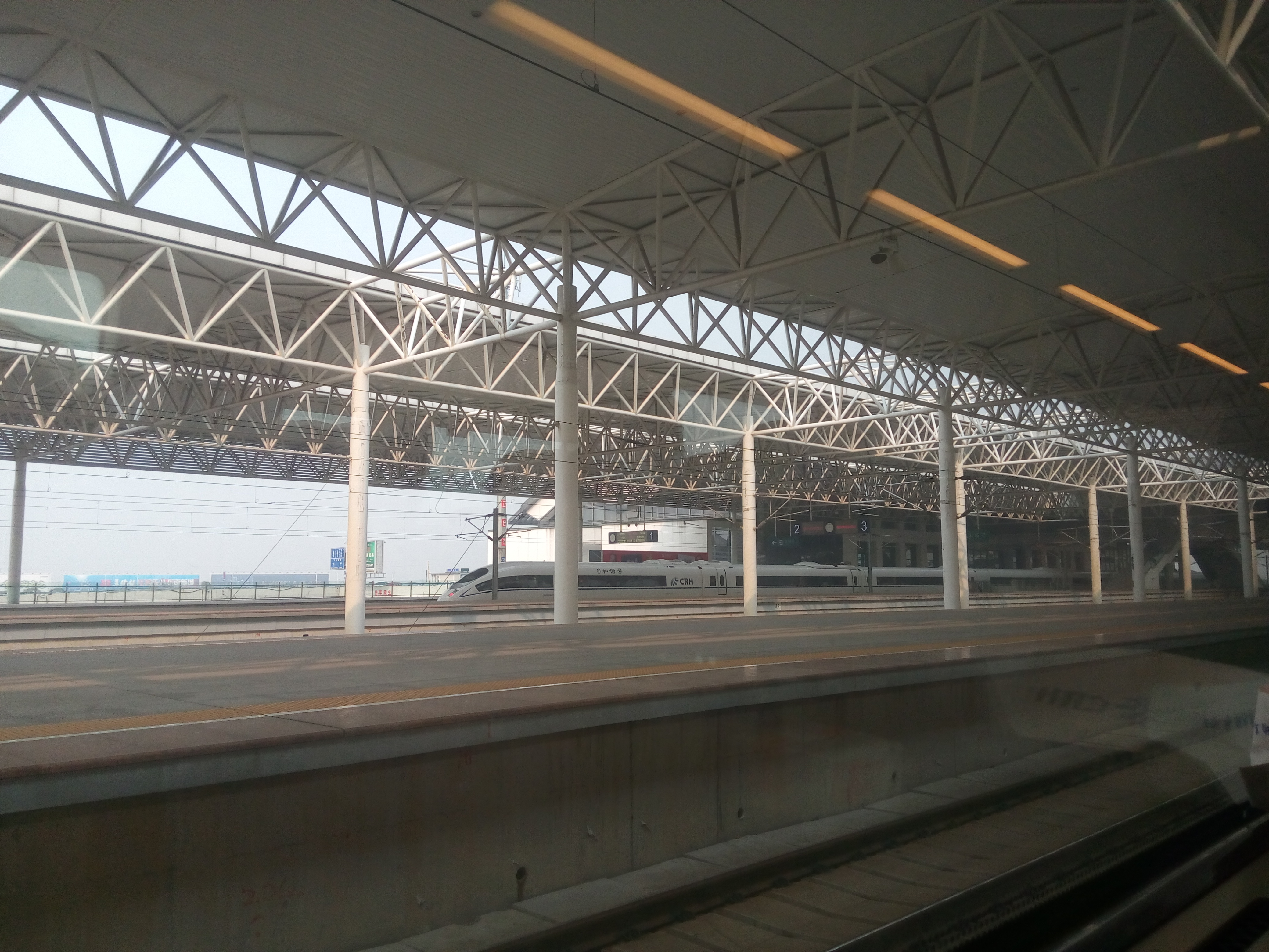 嘉兴南的站台层